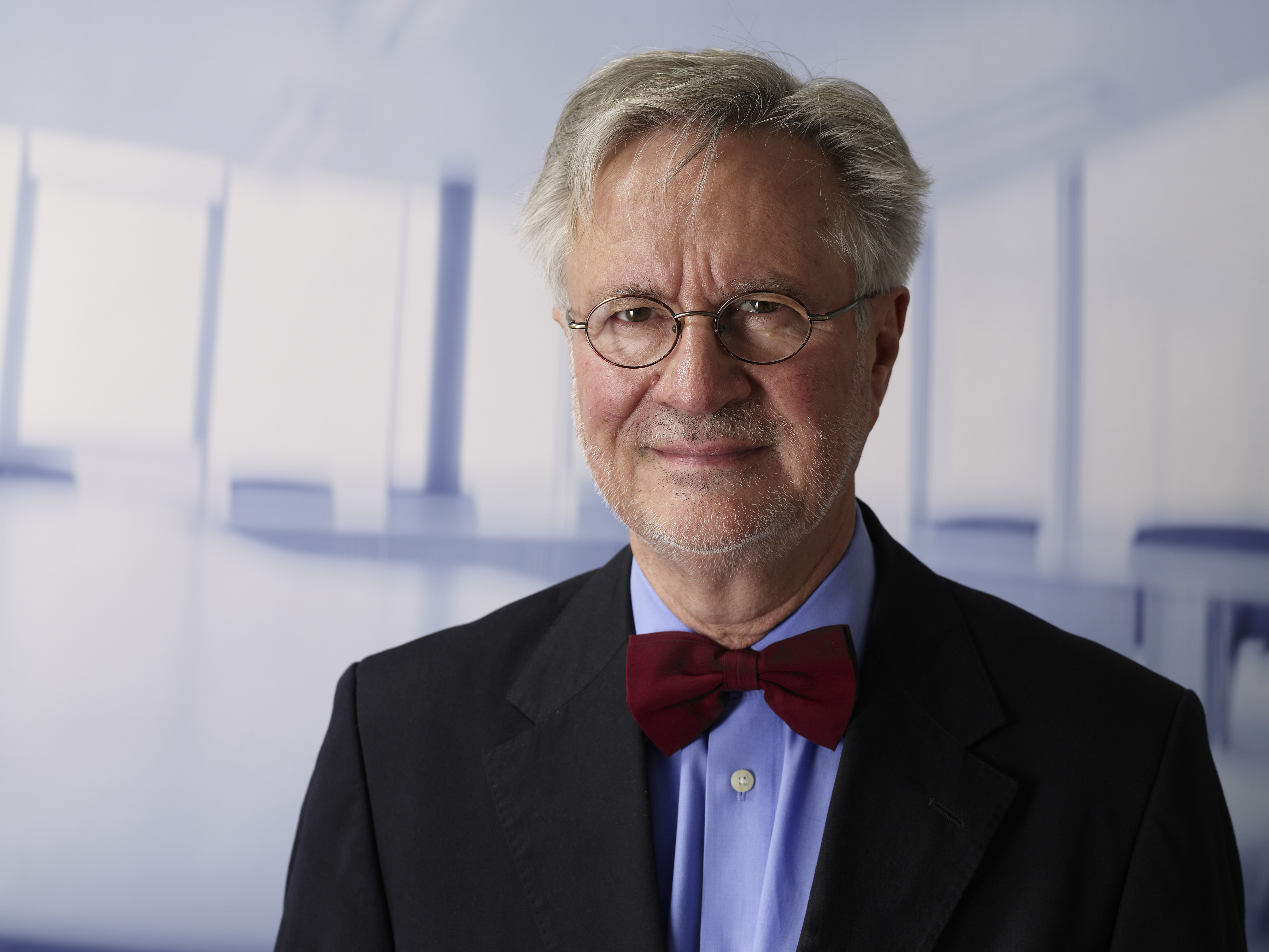 Prof. Dr. Ulrich Trottenberg